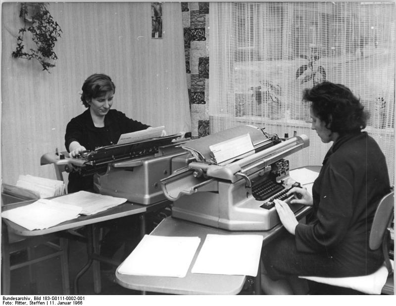 Gardelegen, Kreisbuchungsstation der LPGs Zentralbild Ritter 11.1.1966-Kreisbuchungsstation Gardelegen hilft bei Jahresendabrechnung der Landwirtschaftsbetriebe-Für 15 landwirtschaftliche Betriebe des Kreises führt die Kreisbuchungsstation des Landwirtschaftsrates Gardelegen-Altmark die Finanzrechnung, Materialbuchhaltung, Lohnrechnung und andere Buchungsarbeiten aus. Unser Bild zeigt die Maschinenbuchhalterinnen Adolfine Köhler (links) und Elisabeth Zluwa bei ihrer Arbeit. Bis zum 20. Januar soll im Kreis Gardelegen die gesamte Jahresendabrechnung abgeschlossen sein.